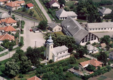 Győzedelmes Szűz Mária-templom, Hejőbába, Hungary, aerialphotography